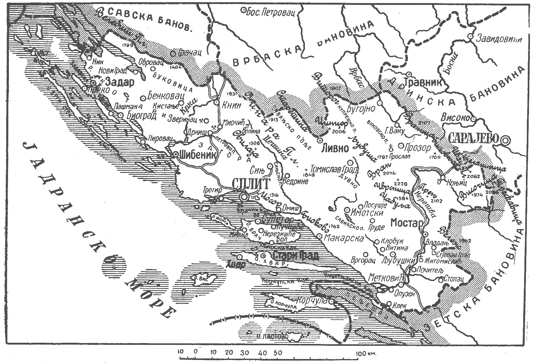 Карта Приморске бановине.